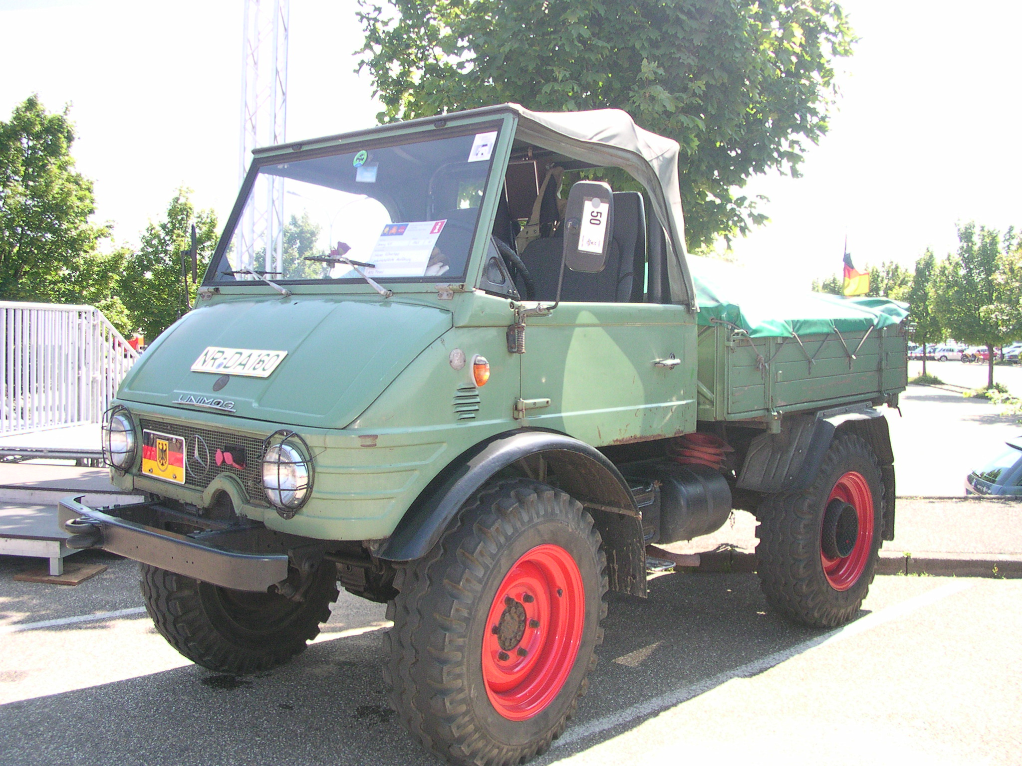 großes Oldtimertreffen im Mercedes-Werk in Wörth am Rhein 2006, Unimog